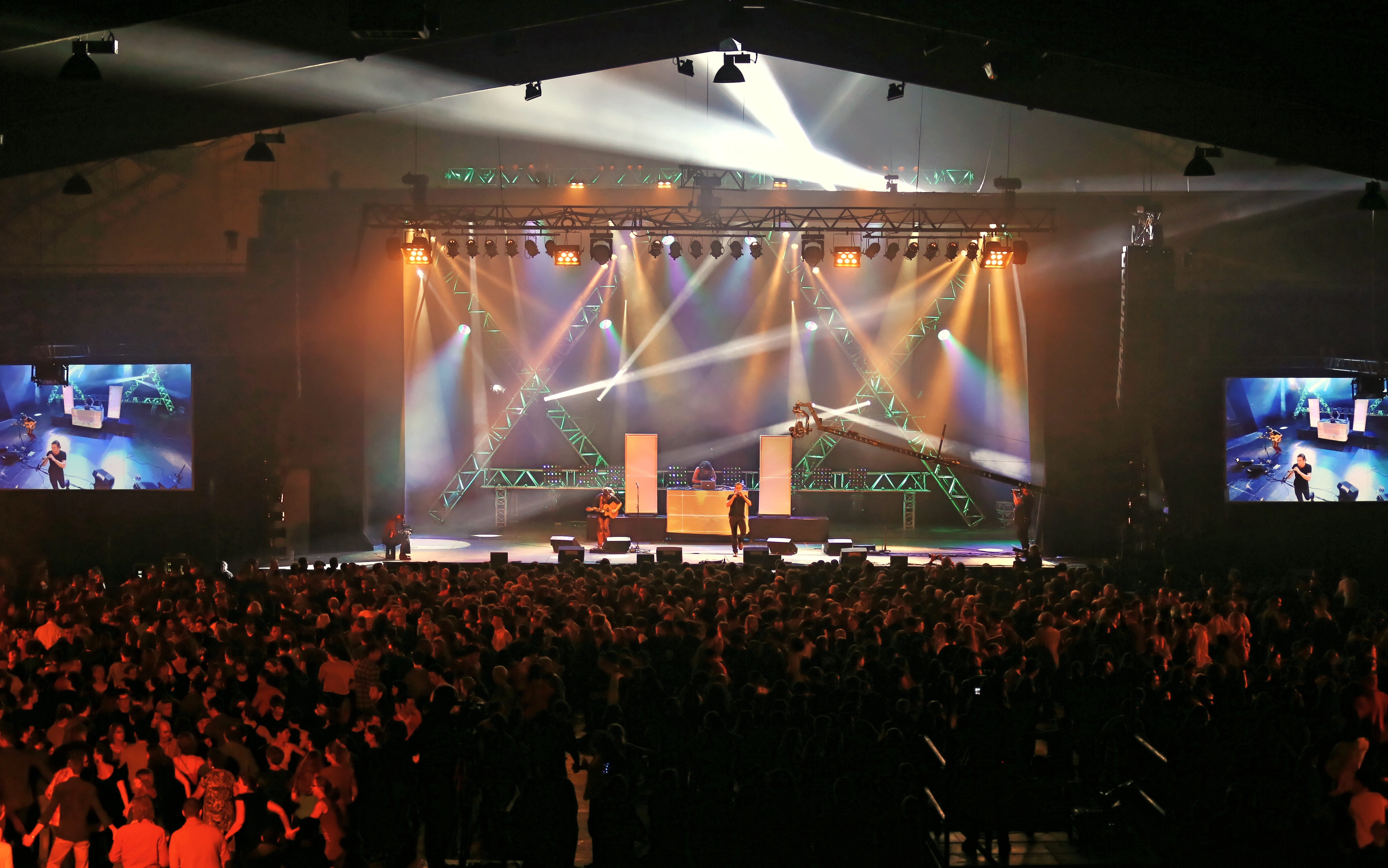 Plantec en fest-noz lors du festival Yaouank le 21 novembre 2015 au Parc des Expositions de Rennes.